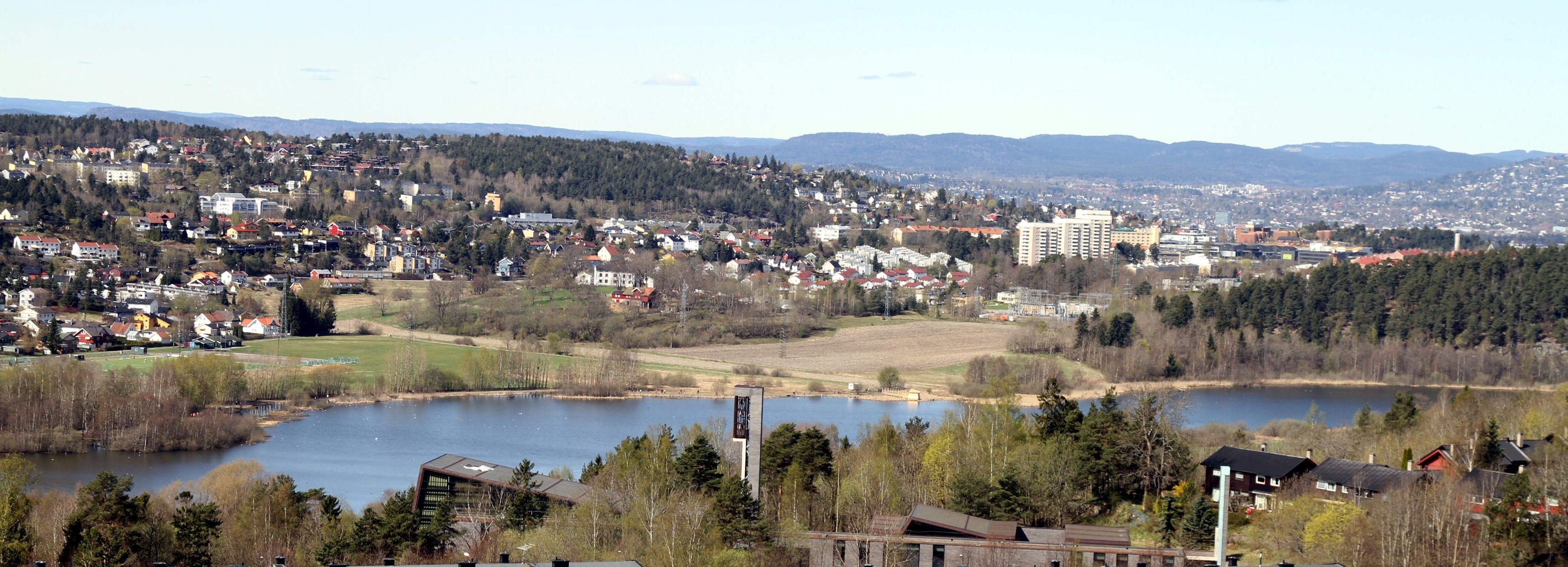 Østensjøvannet i Oslo, sett fra toppen av høyblokk på Bøler.